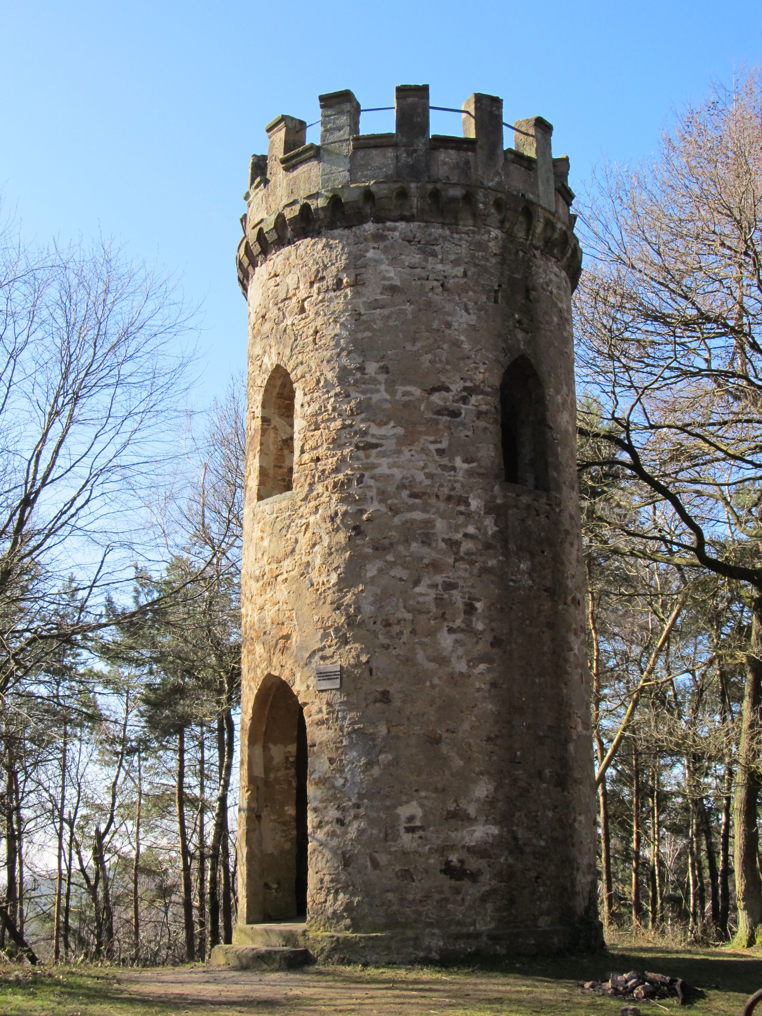 Lübbecke: Wartturm This image shows a heritage building in Germany, located in the North Rhine-Westphalian city Lübbecke (no. 109).